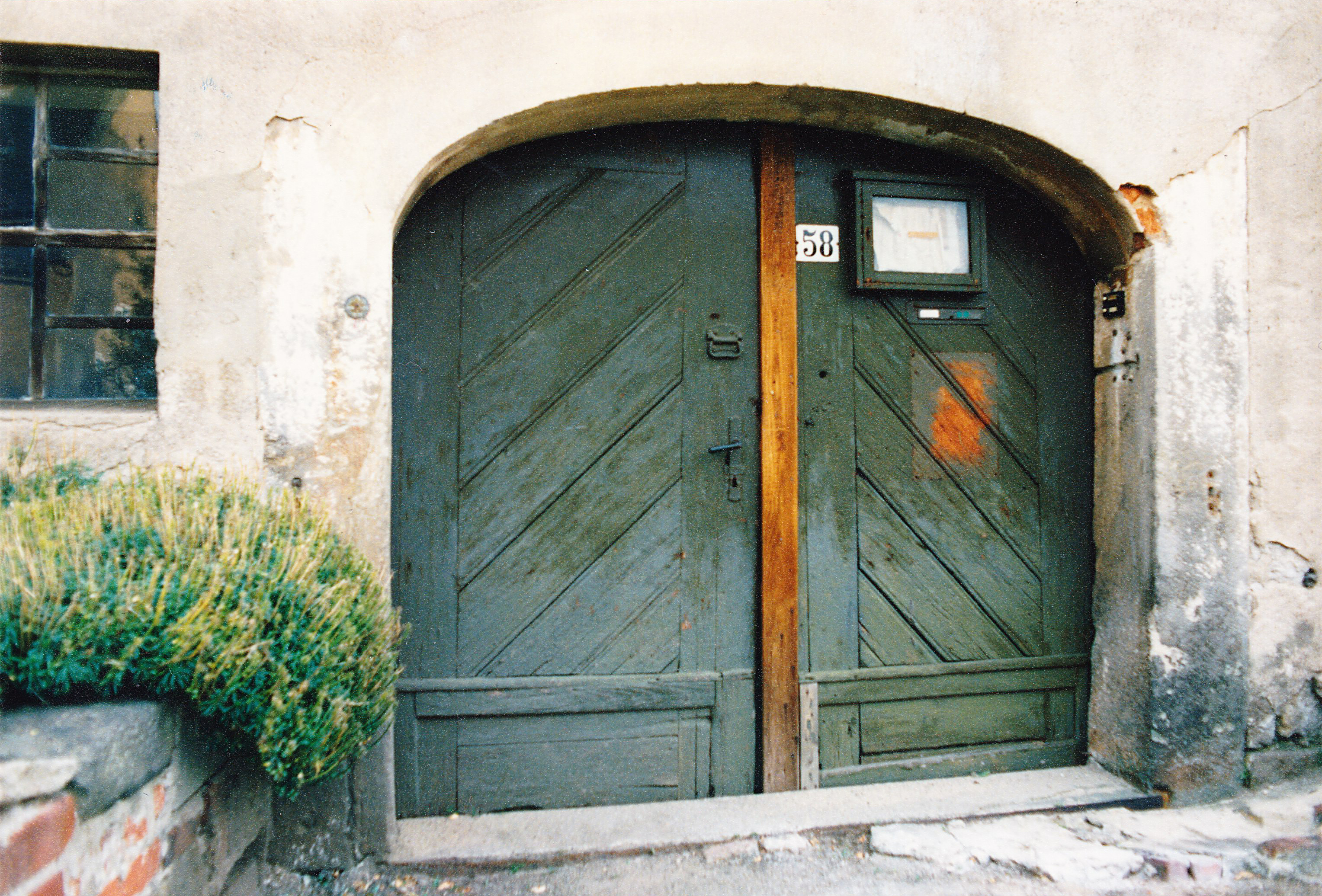 Radebeul-Zitzschewig, Weingut Hausberg, Foto 1992. Einfahrtstor